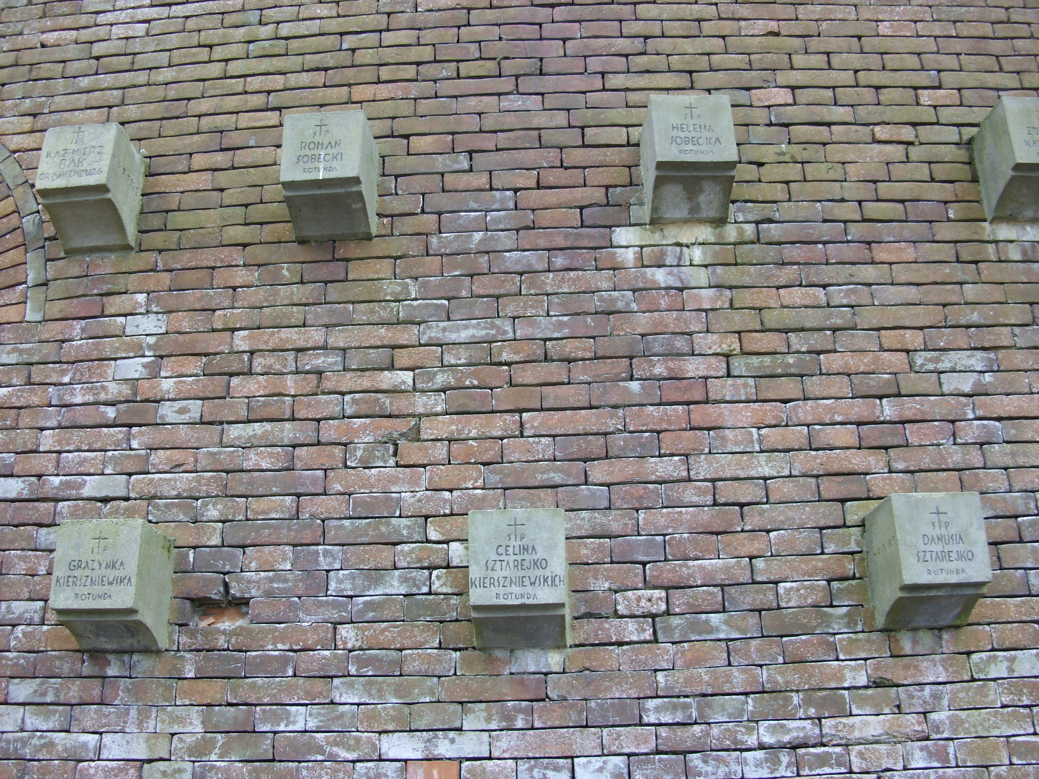 Grażyna Kierszniewska 16-letnia uczennica, harcerka, jej ciotka Celina Sztarejko z Kierszniewskich i jej córka harcerka 17-letnia Danuta Sztarejko. Tablice pamięci w Rotundzie Zamojskiej. Zamordowane przez gestapo 8 lipca 1940 r.